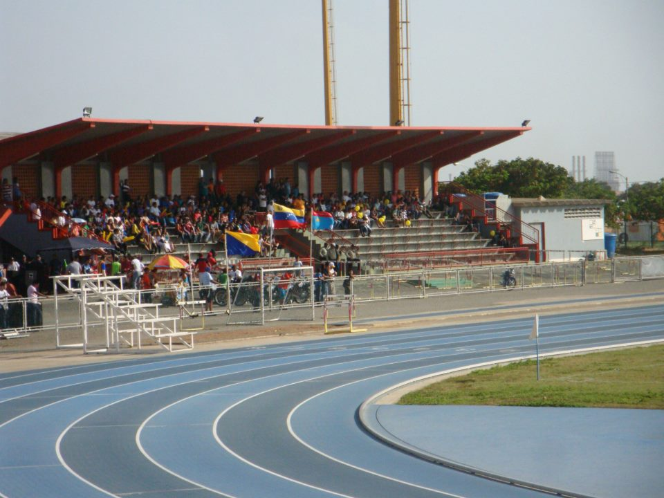 Un estadio con capacidad del 1.200 personas.